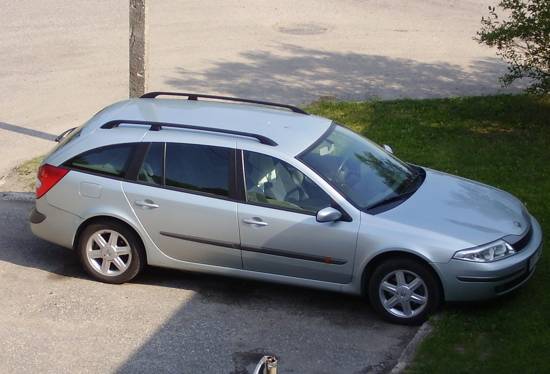 Renault Laguna GrandTourer Automatic transmission, 1.8L, 2002